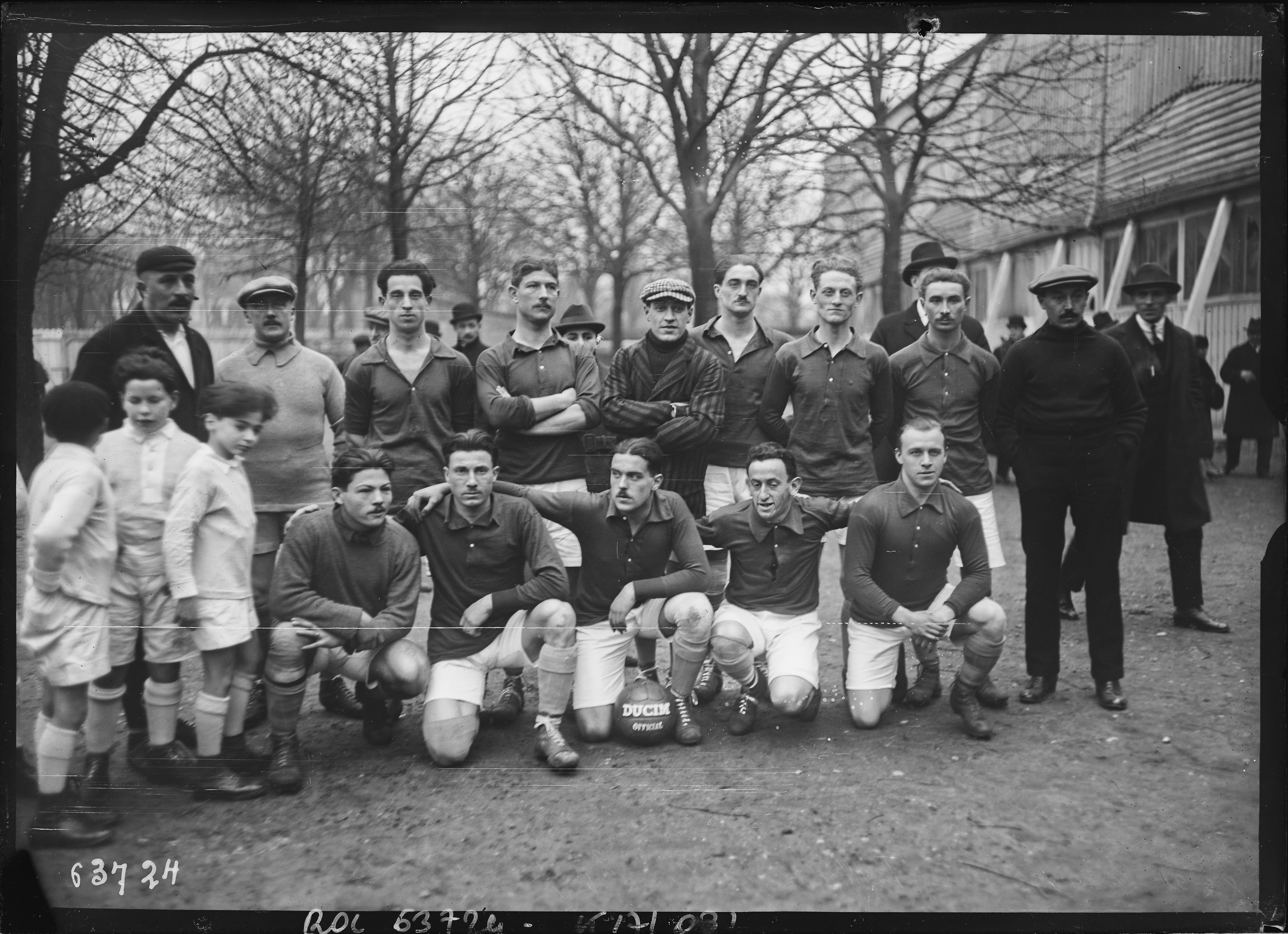 Equipe de France 1921